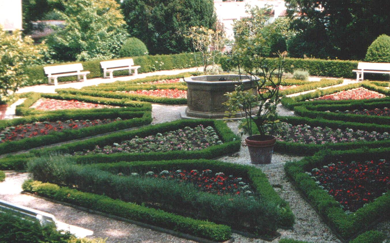 Renaissancegarten im Regensburger Herzogspark Aufnahmejahr:1998